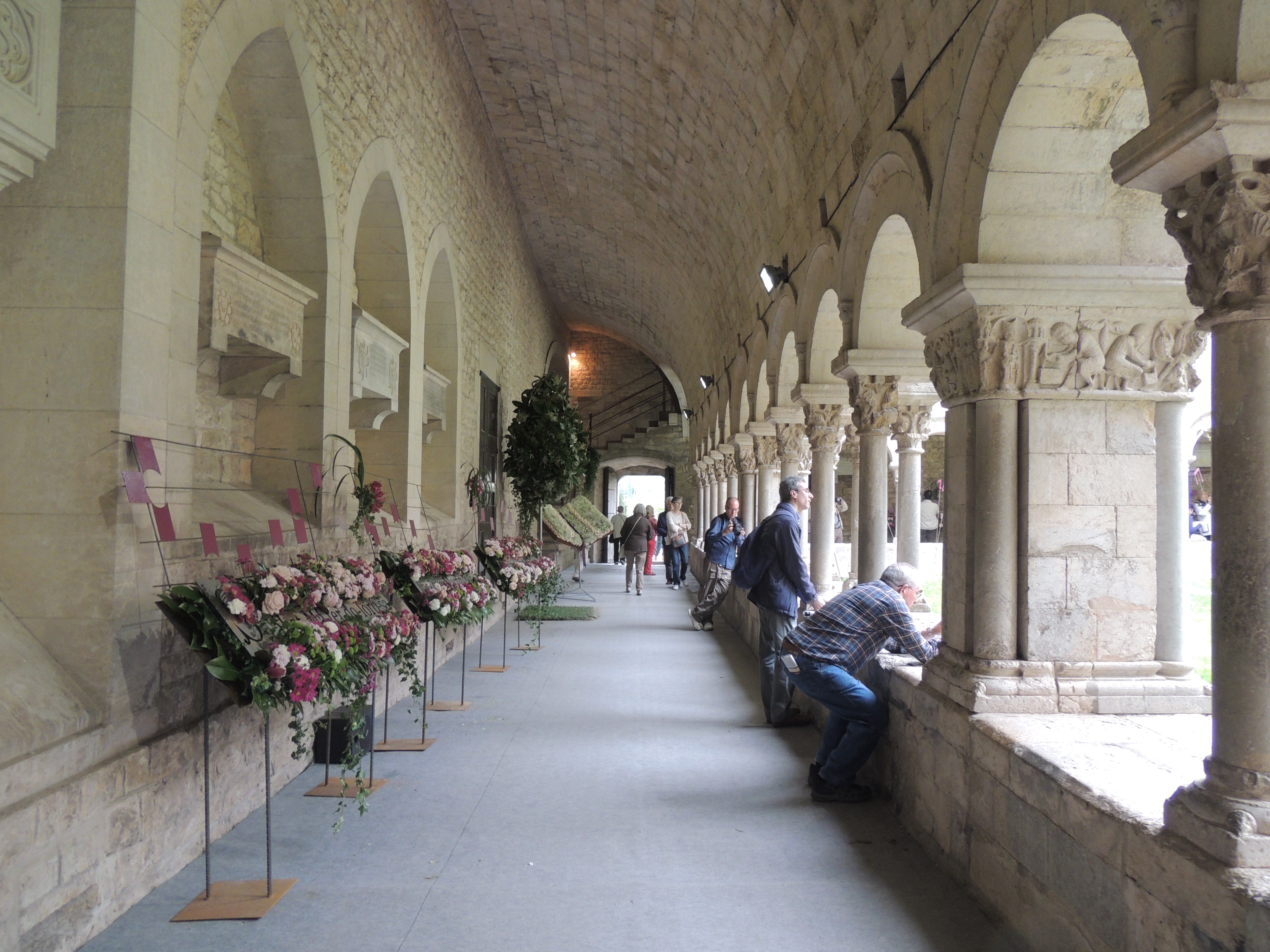 claustre catedral